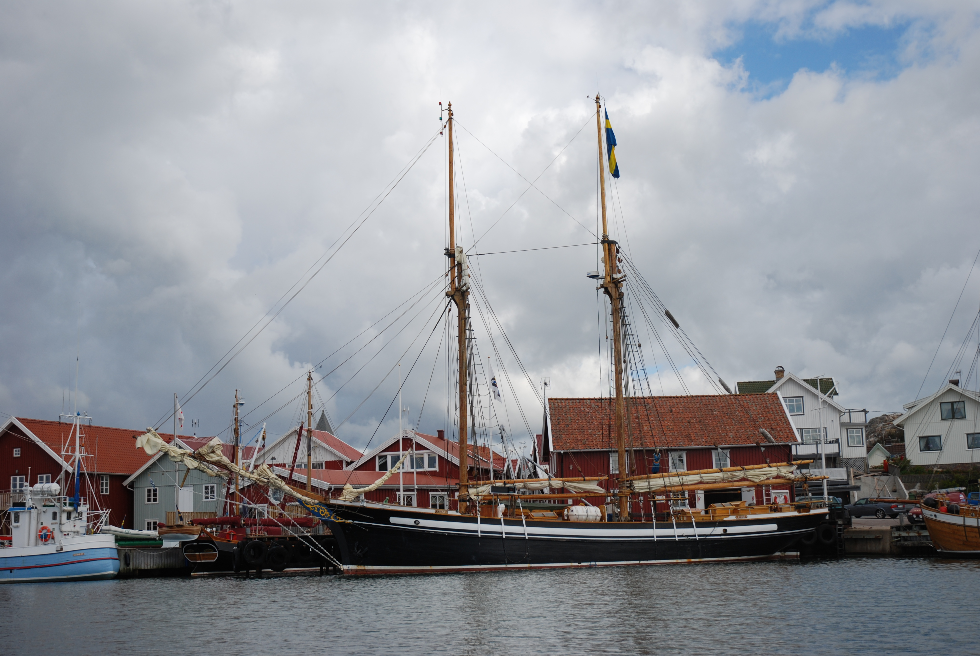 M/S Atene, Skärhamn, Sweden